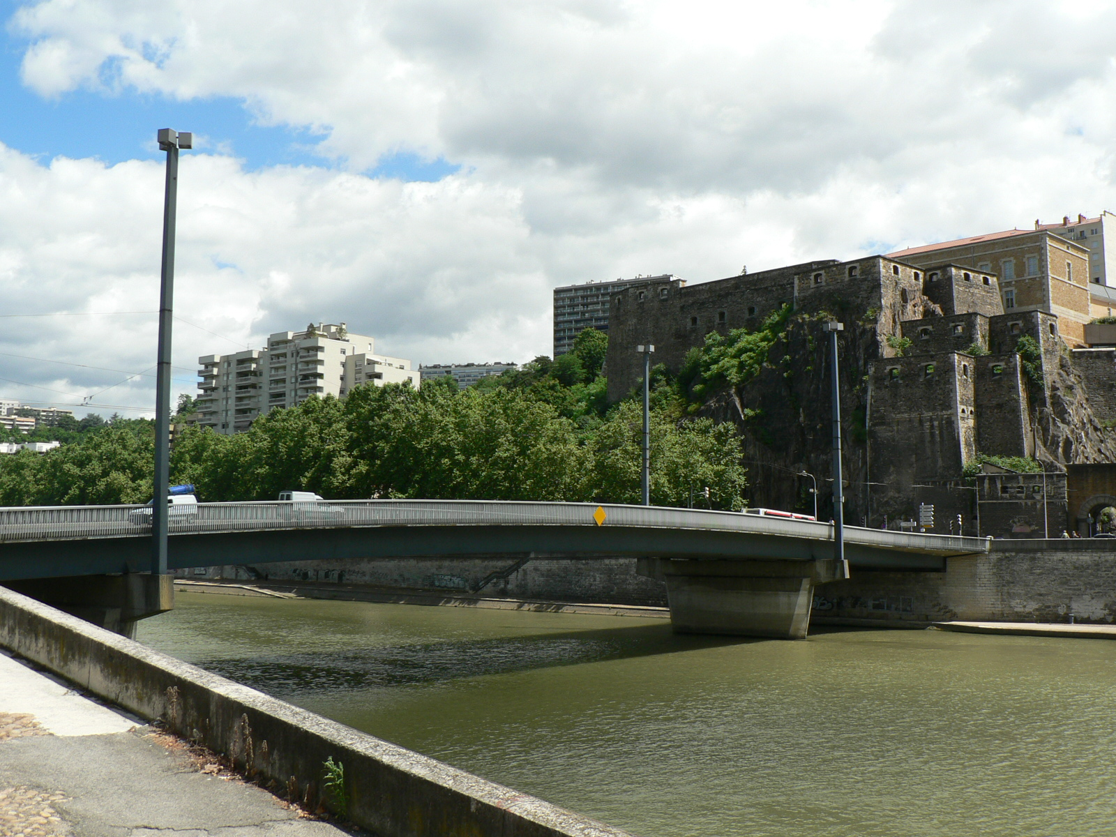 Ponts de Lyon - Pont Kœnig